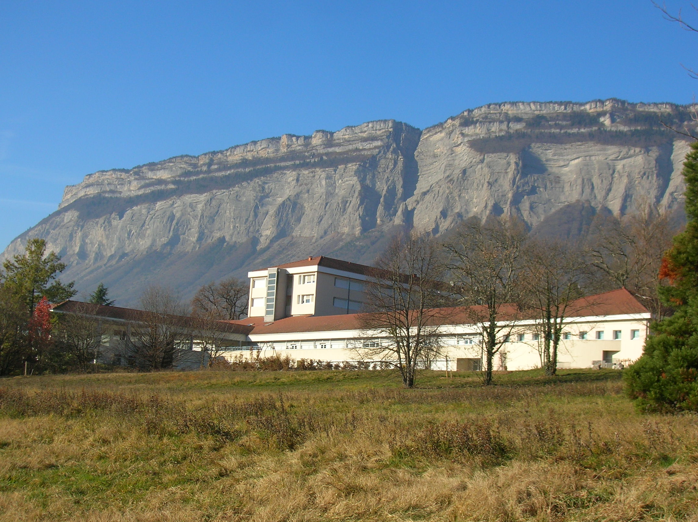 Lycée horticole Grenoble - Saint Ismier et parc du Château Randon. Saint-Ismier, Isère, Rhone-Alpes, France.